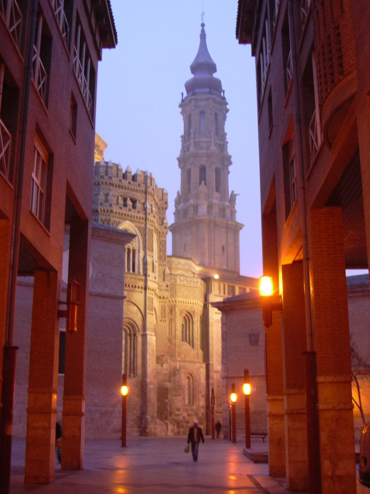 La Seo, Zaragoza, de noche, vista desde la plaza de san Bruno